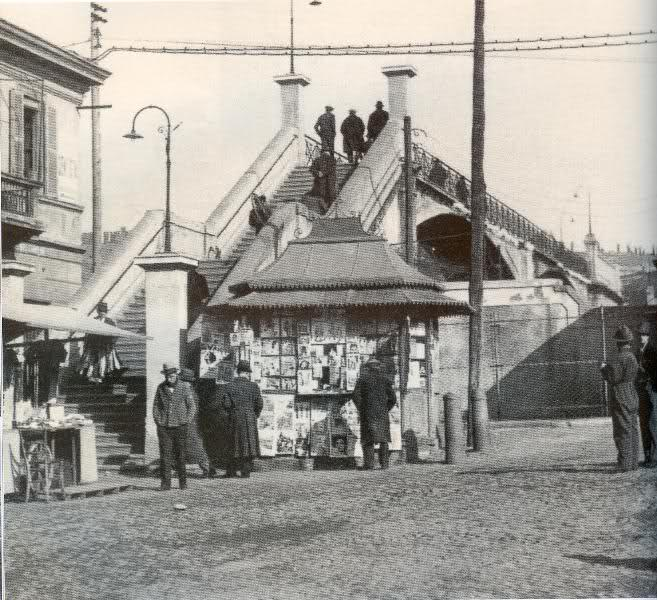 Milano, la vecchia passerella che connetteva la via Borsieri a corso Como